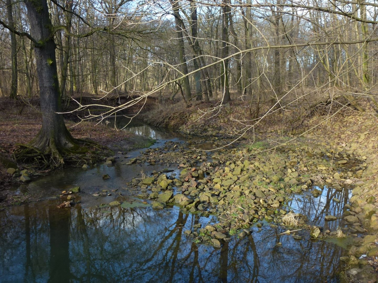 Schlangengraben im Salegaster Forst östlich von Wolfen